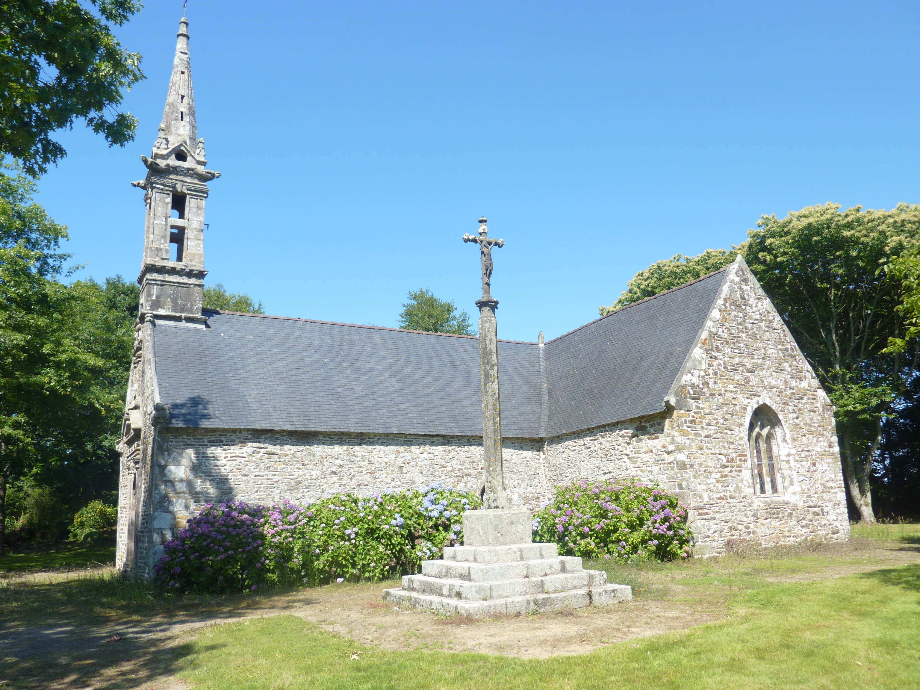 Le Cloître-Pleyben : chapelle Saint-Jean-Baptiste 1